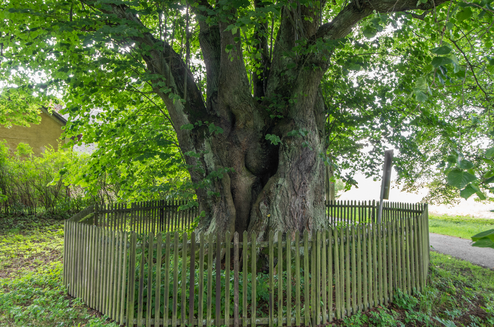 památný strom Lubská lípa, Horní Luby, okres Cheb